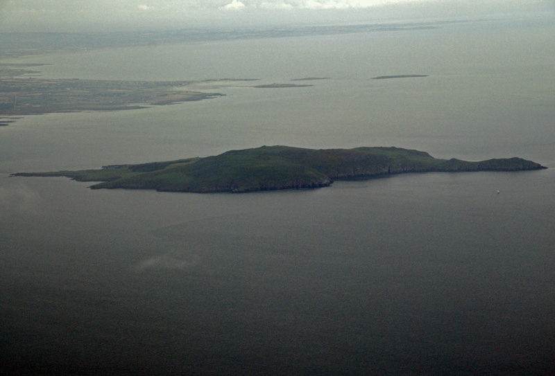 Lambay Island en un vuelo Barcelona-Dublín